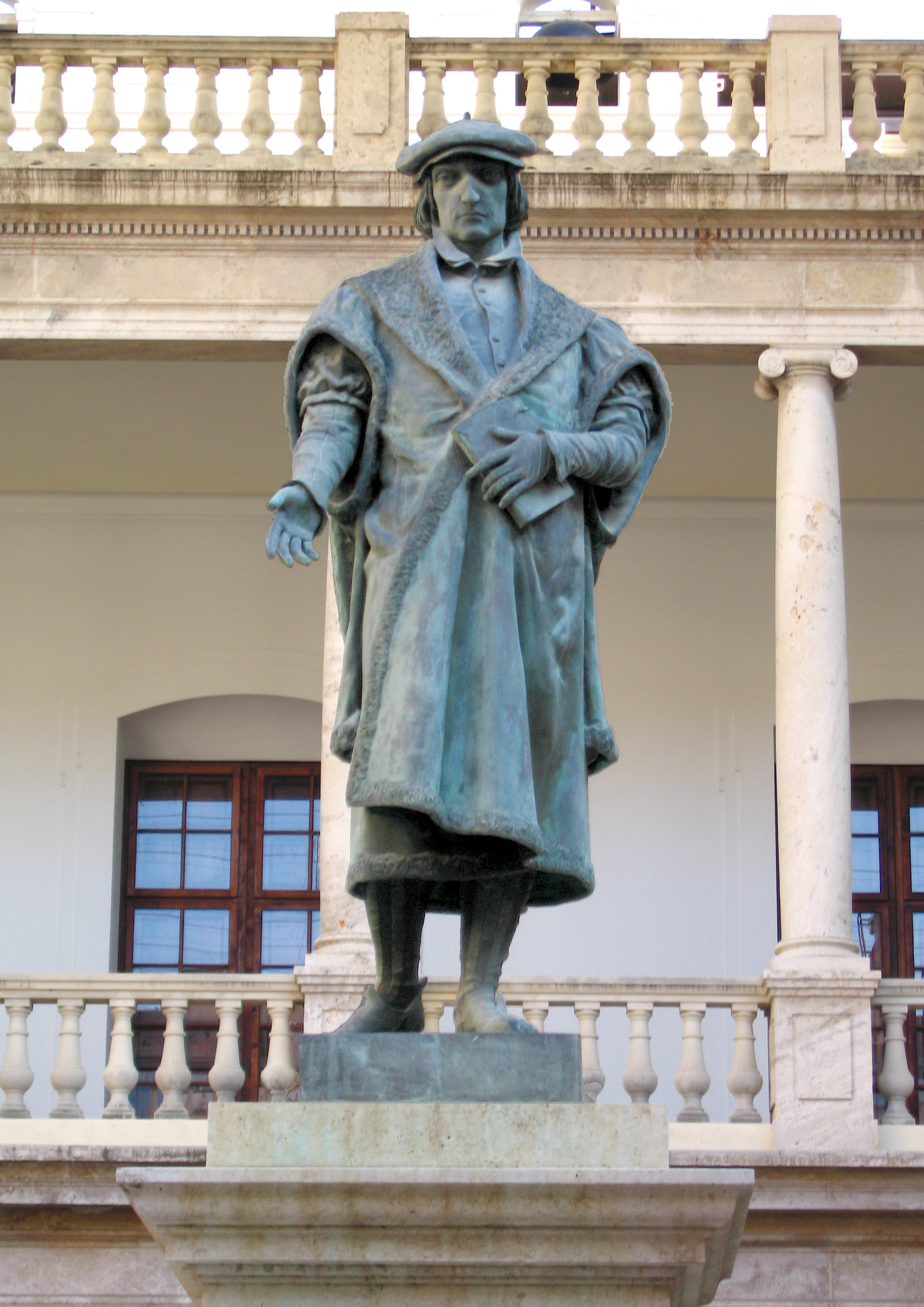 Estàtua de Lluís Vives (UVEG), València